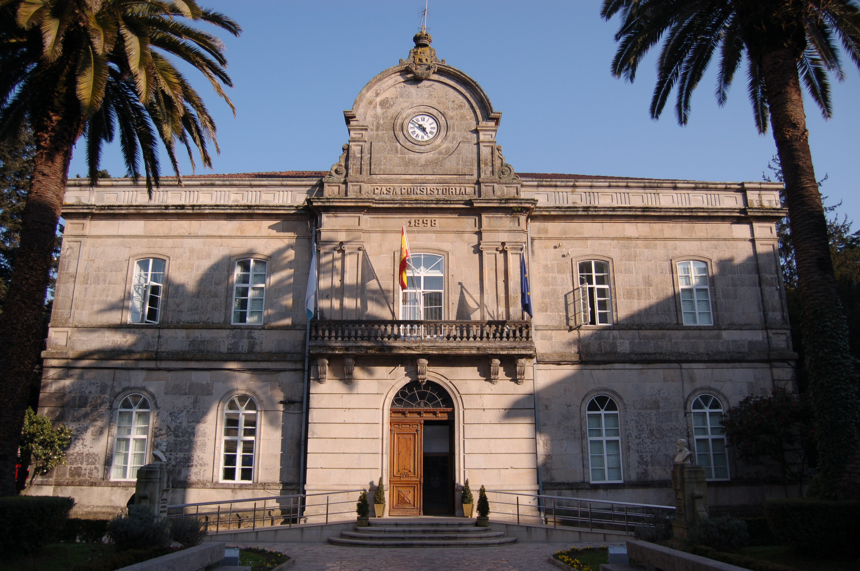 Casa consistorial de Ponteareas